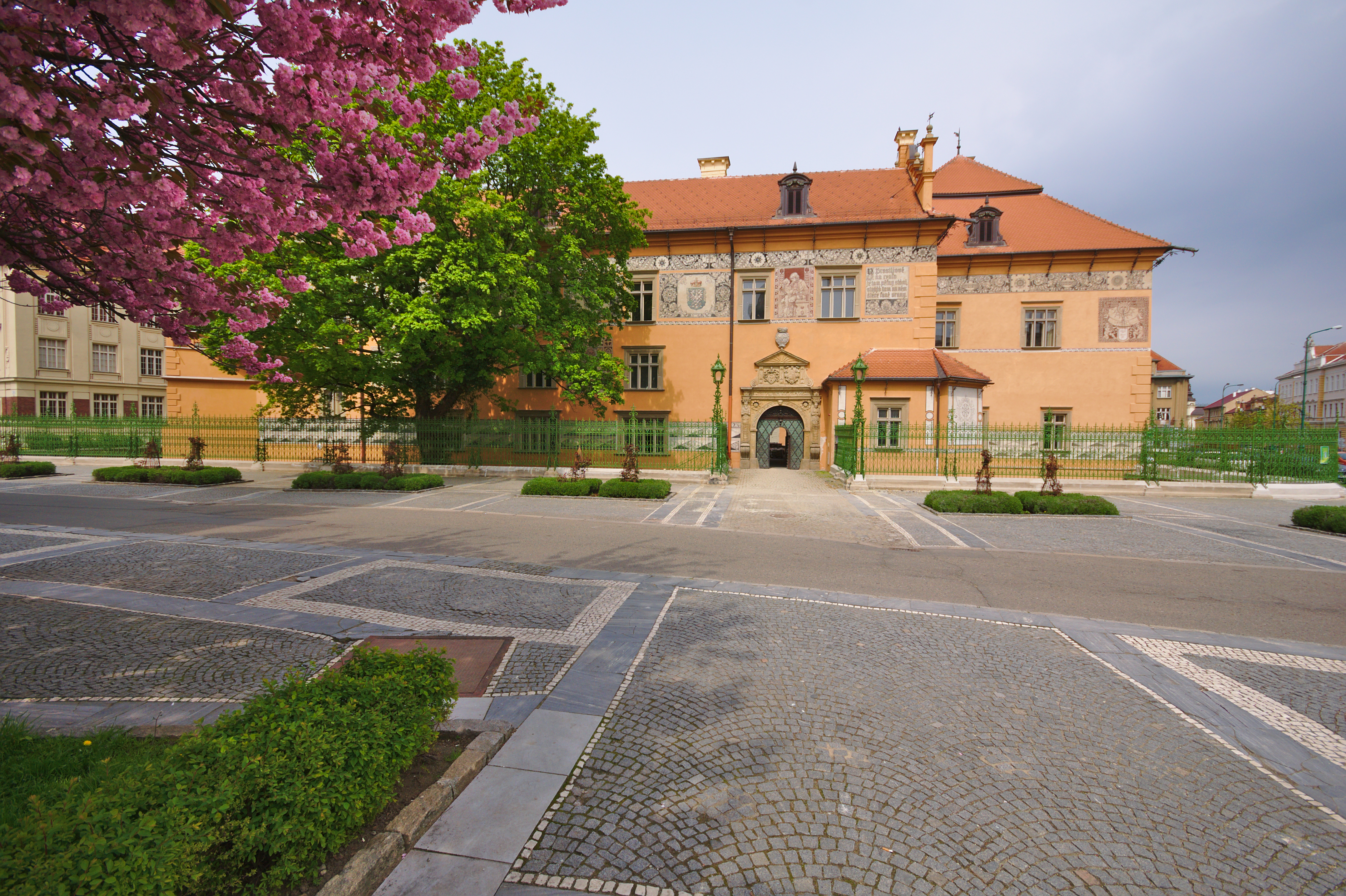 Prostějovský zámek